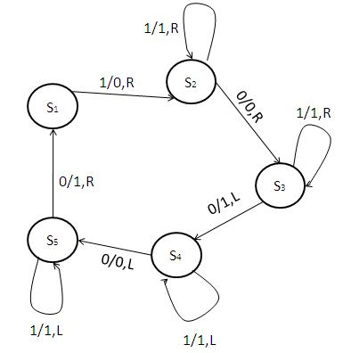 Ejemplo de una Máquina de Turing